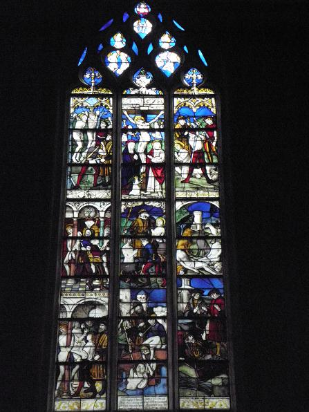 Vitrail Huit scènes de la vie des saints Créspin et Créspinien dans la co-cathédrale N.D. de Bourg-en-Bresse (01).